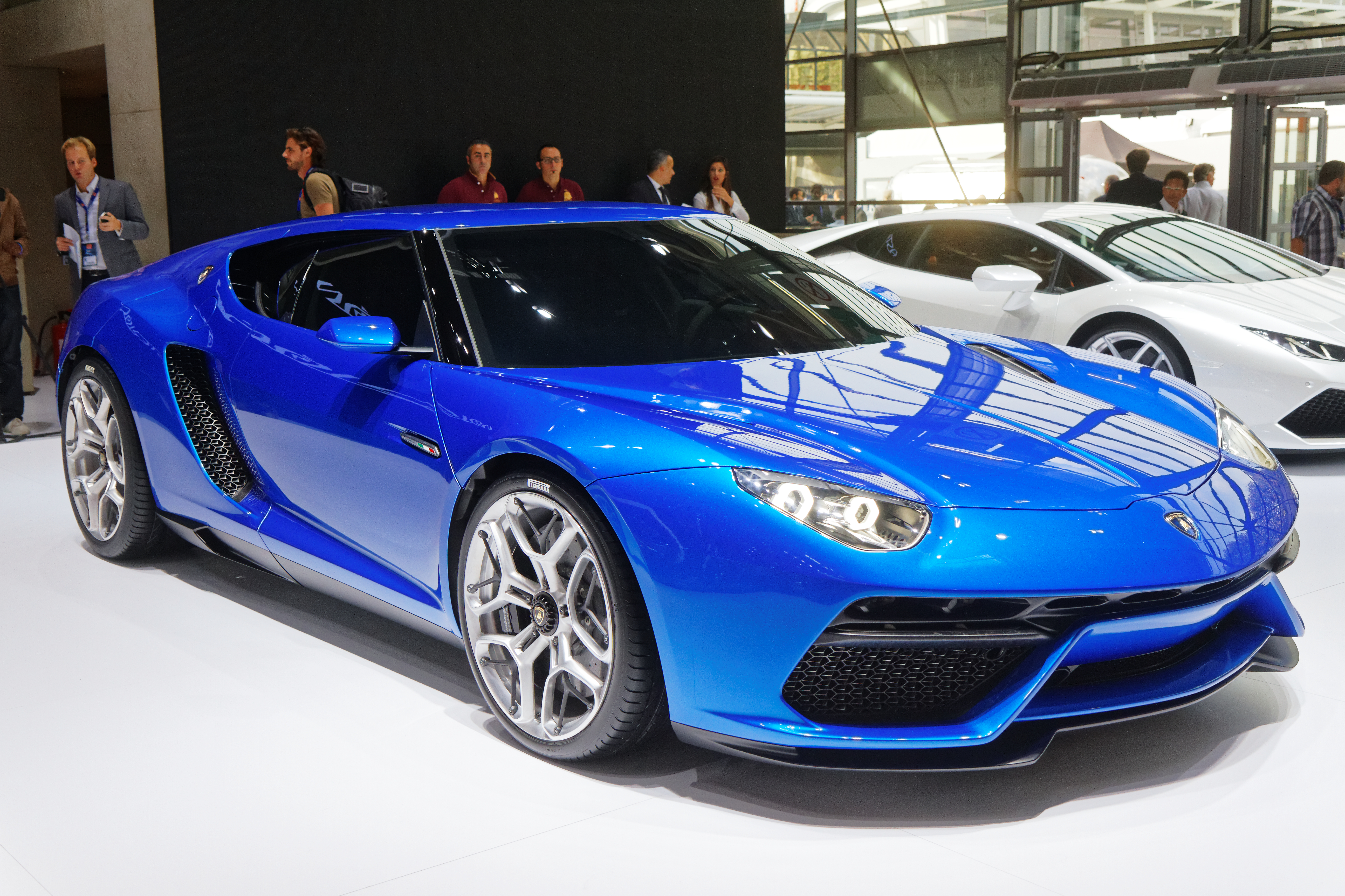 Une Lamborghini Asterion présentée lors du mondial de l'automobile de Paris 2014.